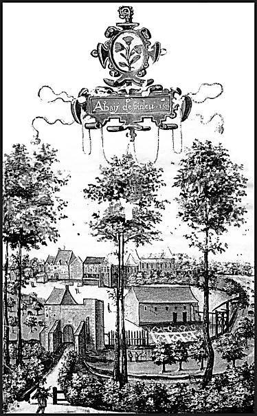 Abbaye d'Épinlieu. Reproduction tirée de l'album de Croy, XVIe siècle